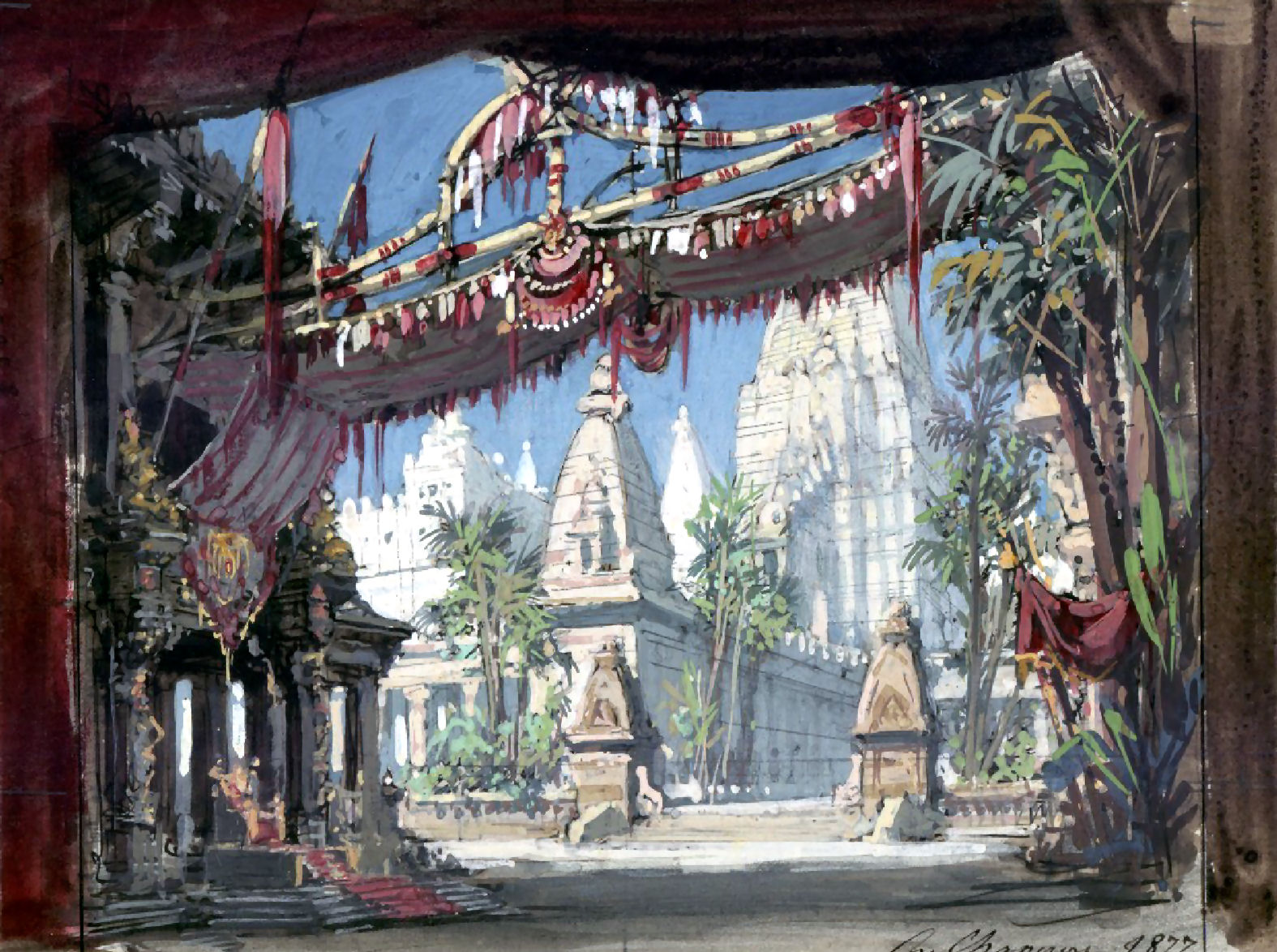 Esquisse de décor pour l'acte IV de L'africaine de Meyerbeer par Philippe Chaperon